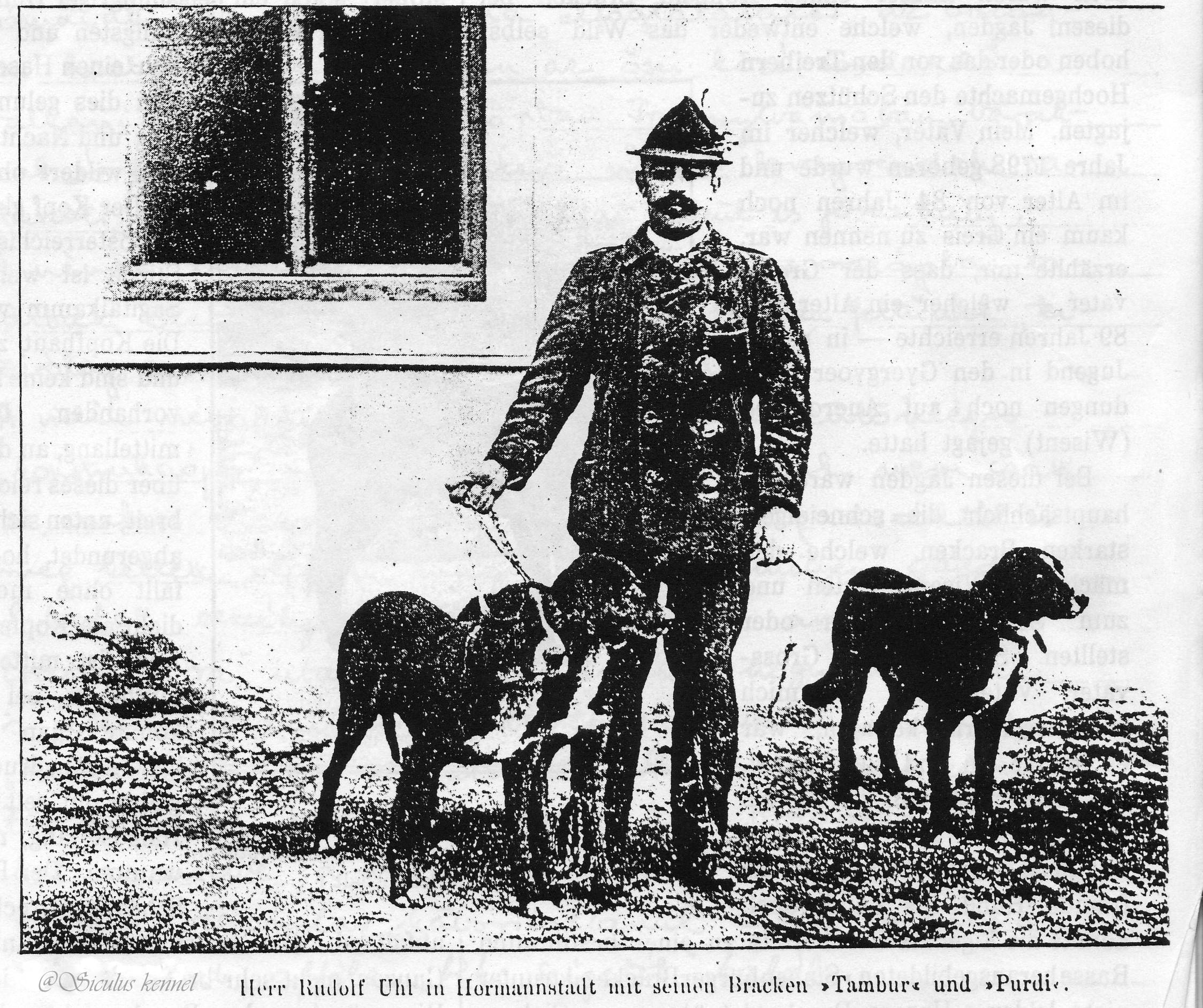 Copoi ardelenesti din Sibiu (Hermannstadt) 1901, din revista Waildmannsheil!